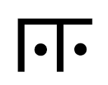 иянна тамильская